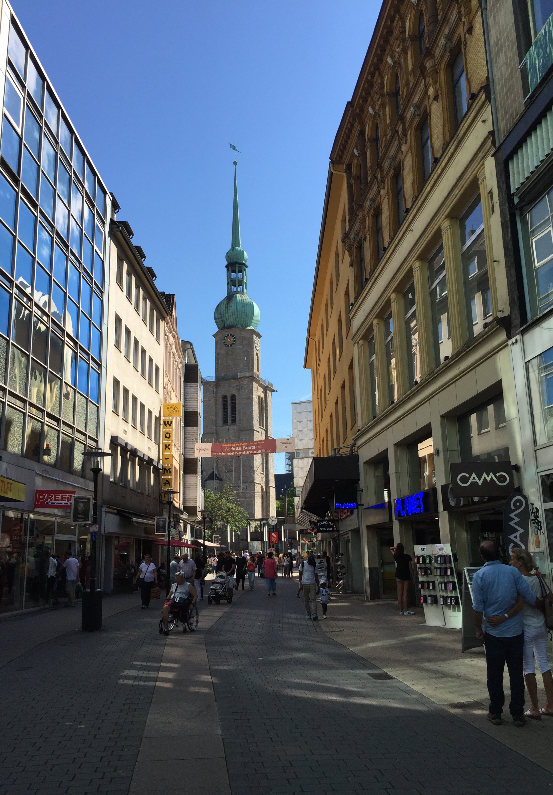 Brückstraße in Dortmund, Blickrichtung St. Reinoldi This is a photograph of an architectural monument. 0082